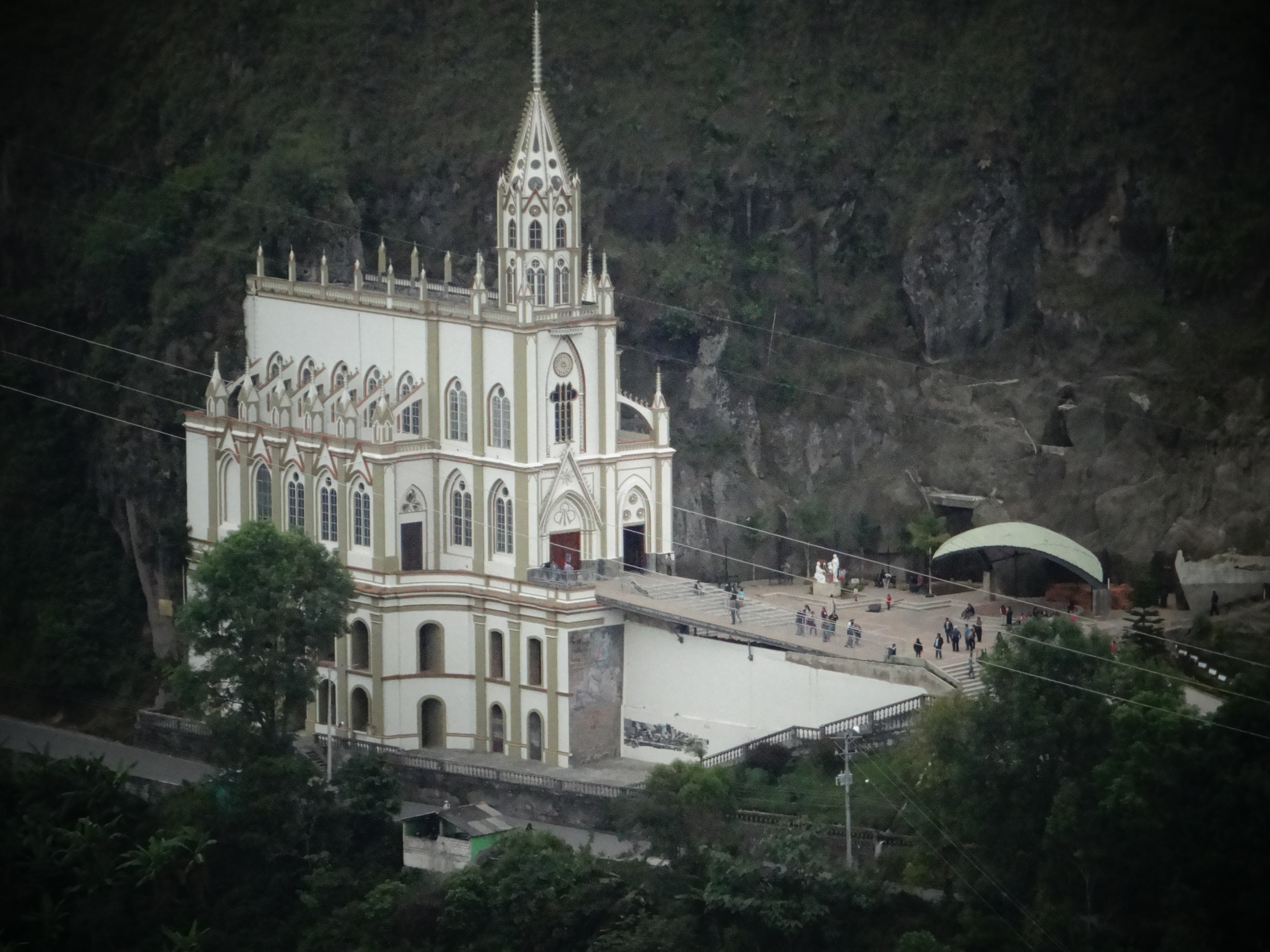 Santuario de la Virgen de la Playa, lugar que alberga la imagen de María Virgen Junto a su hijo el niño Jesús.